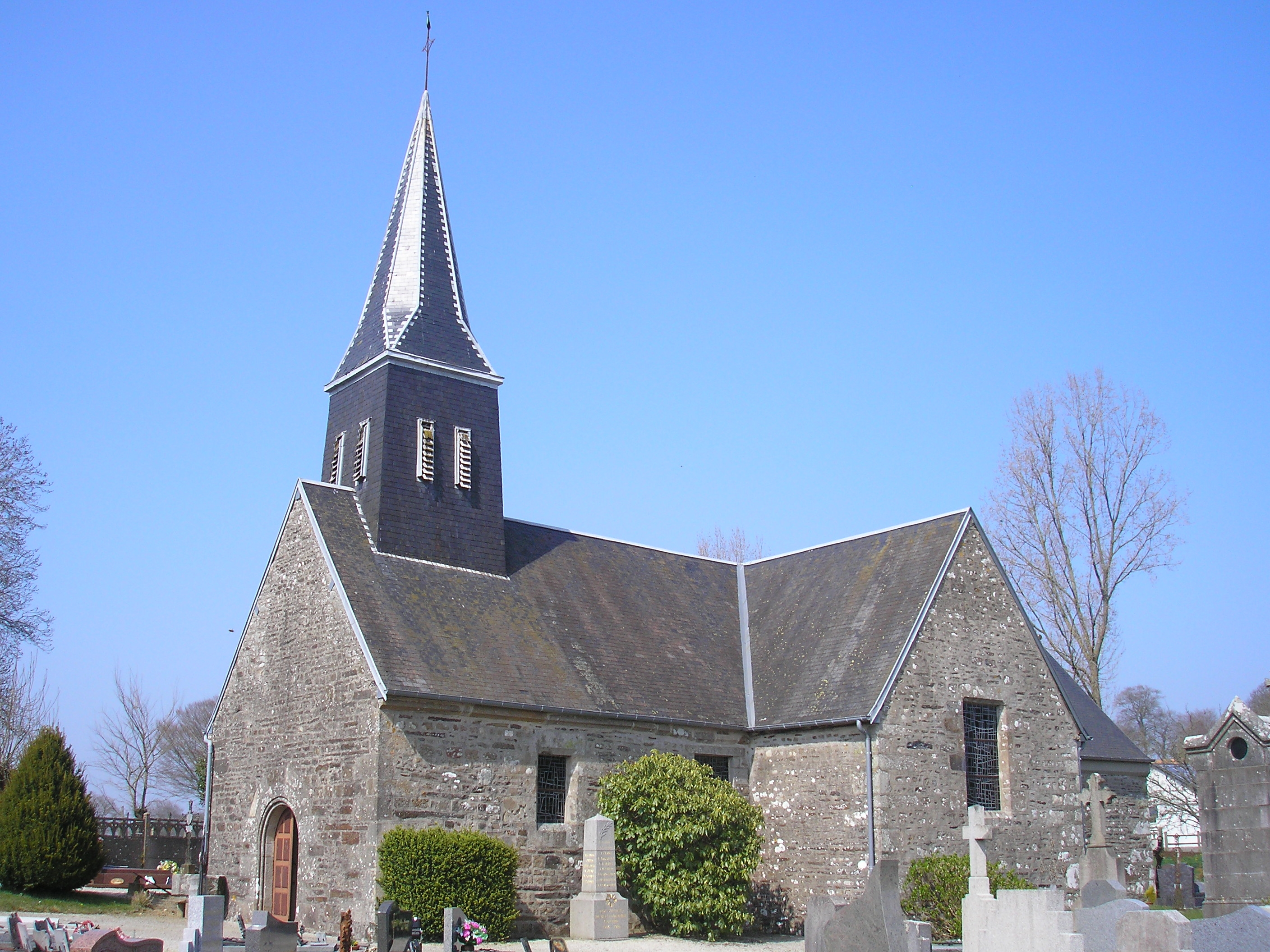 Bellefontaine (Normandie, France). L'église Saint-Martin.